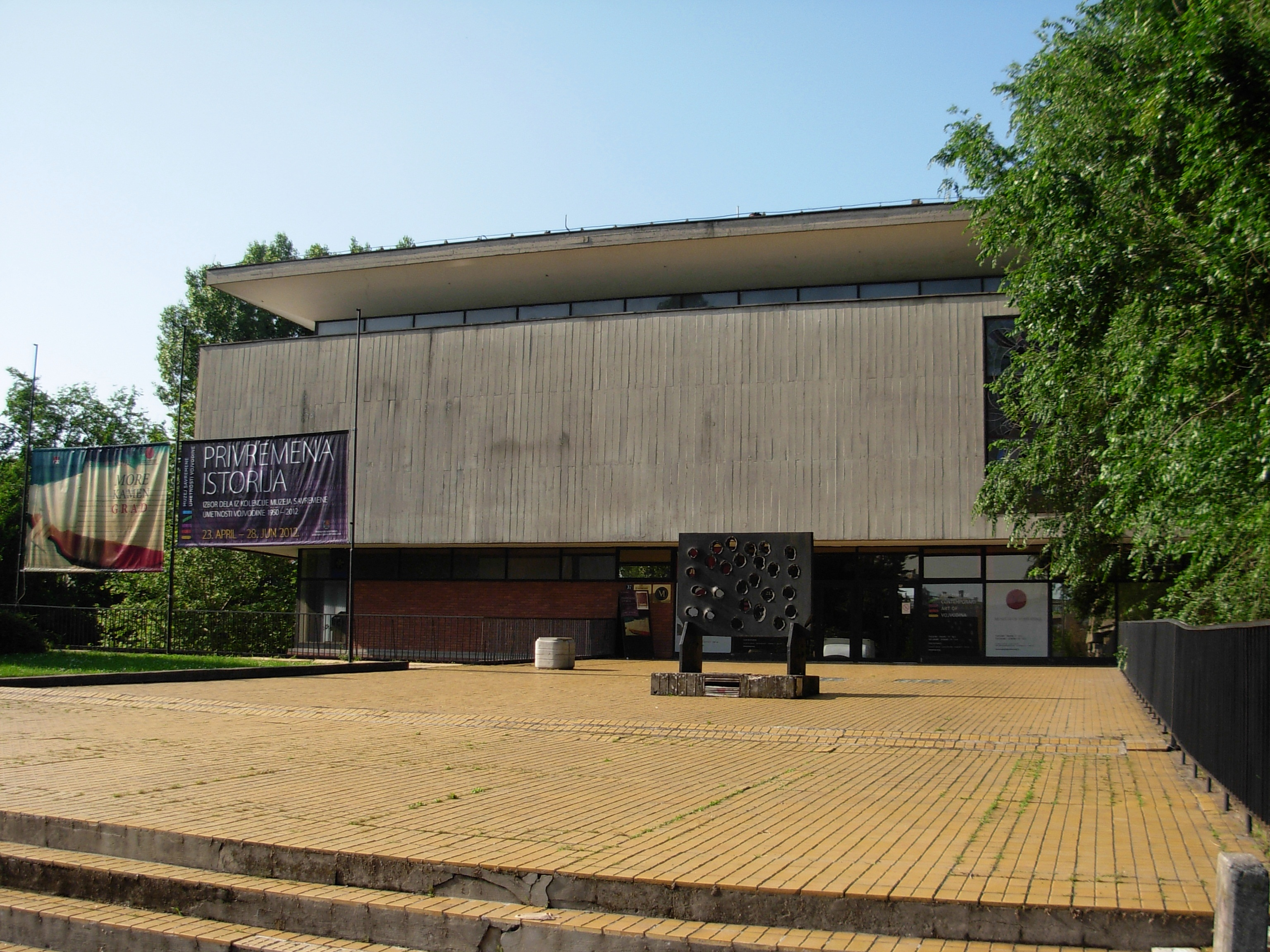 Muzej savremene umetnosti Vojvodine.